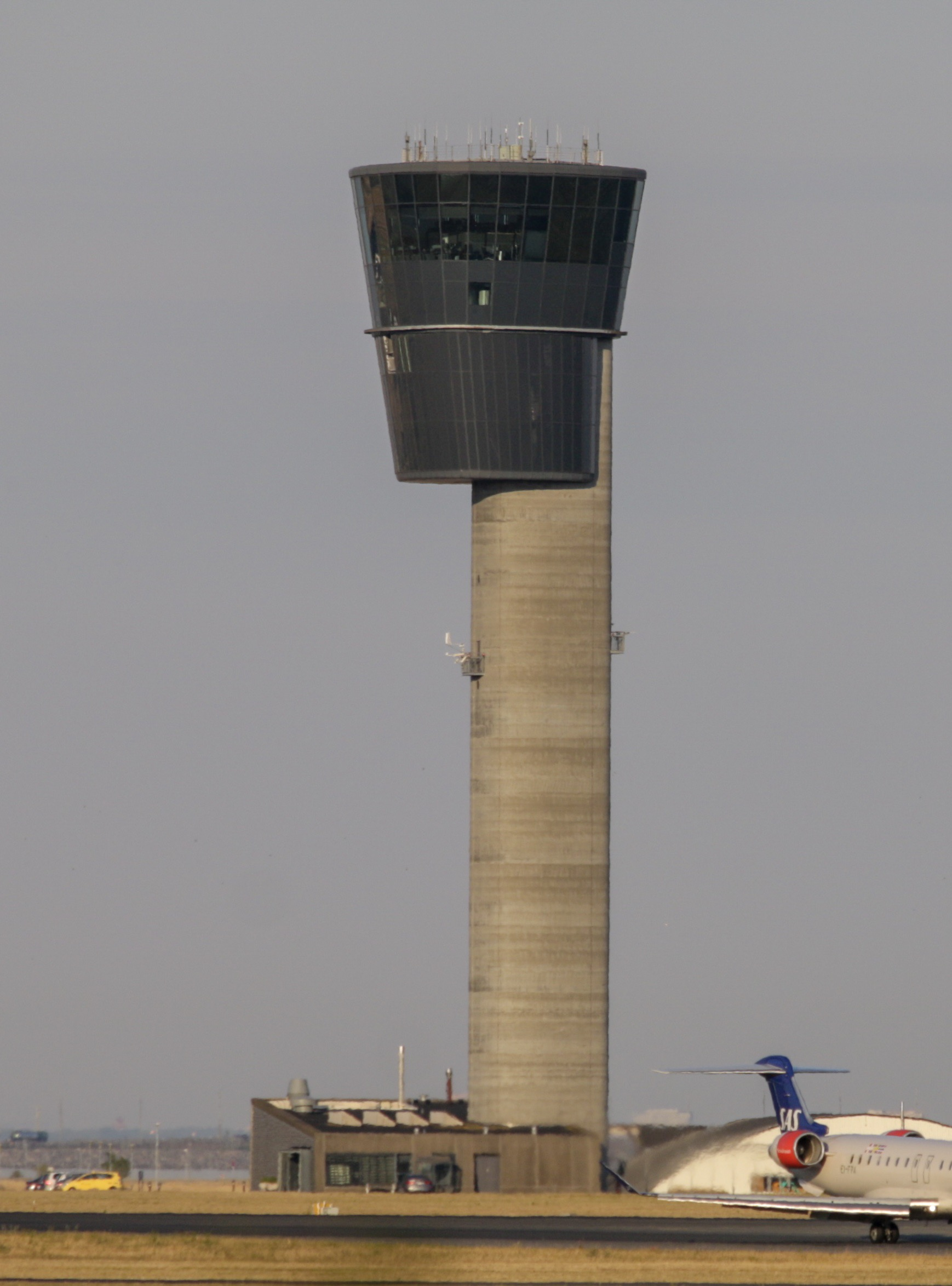 Flygledartornet på Copenhagen Airport